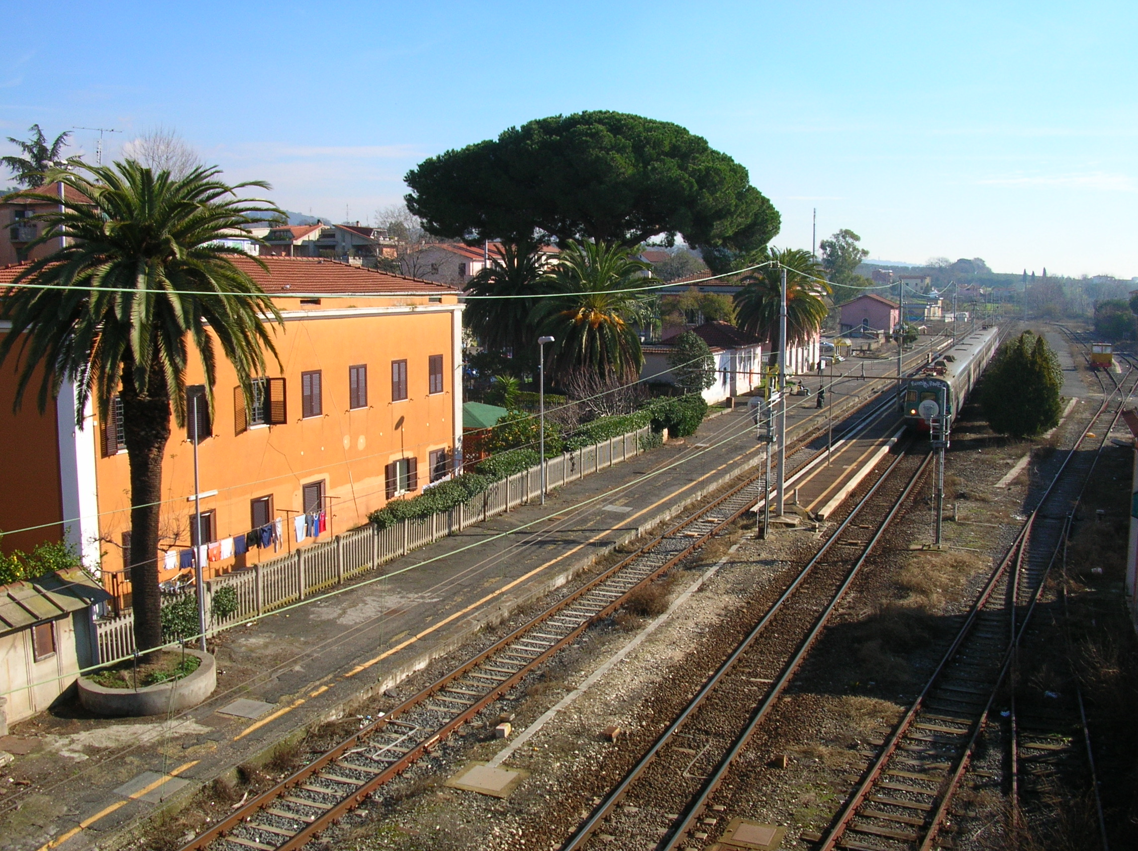 Stazione Cecchina particolare